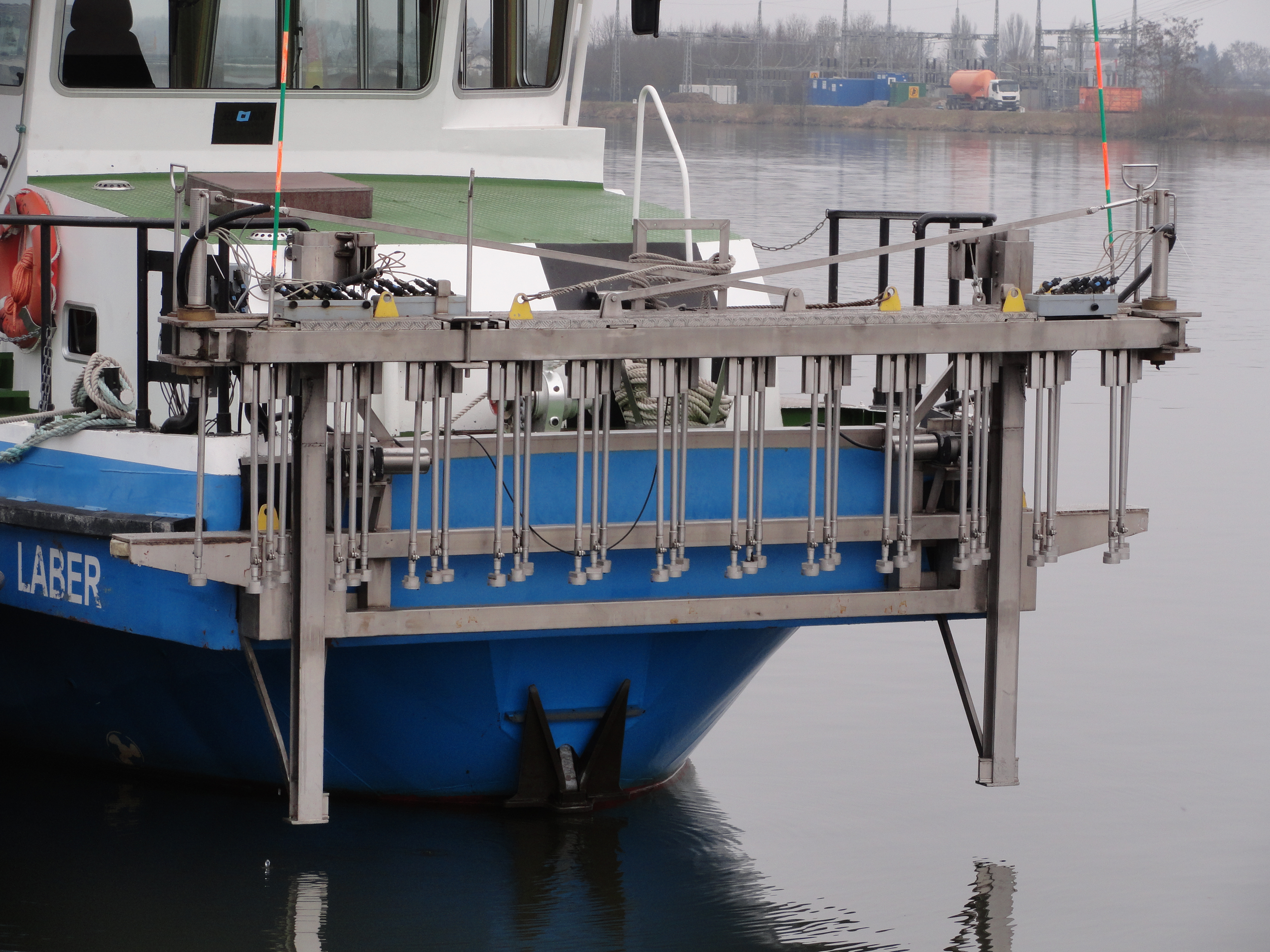 Peilschiff Laber der WSV im Oberwasser der Staustufe Straubing; Flächenecholotsystem von Kongsberg Maritim AB mit 37 Schwingern für 200 kHz